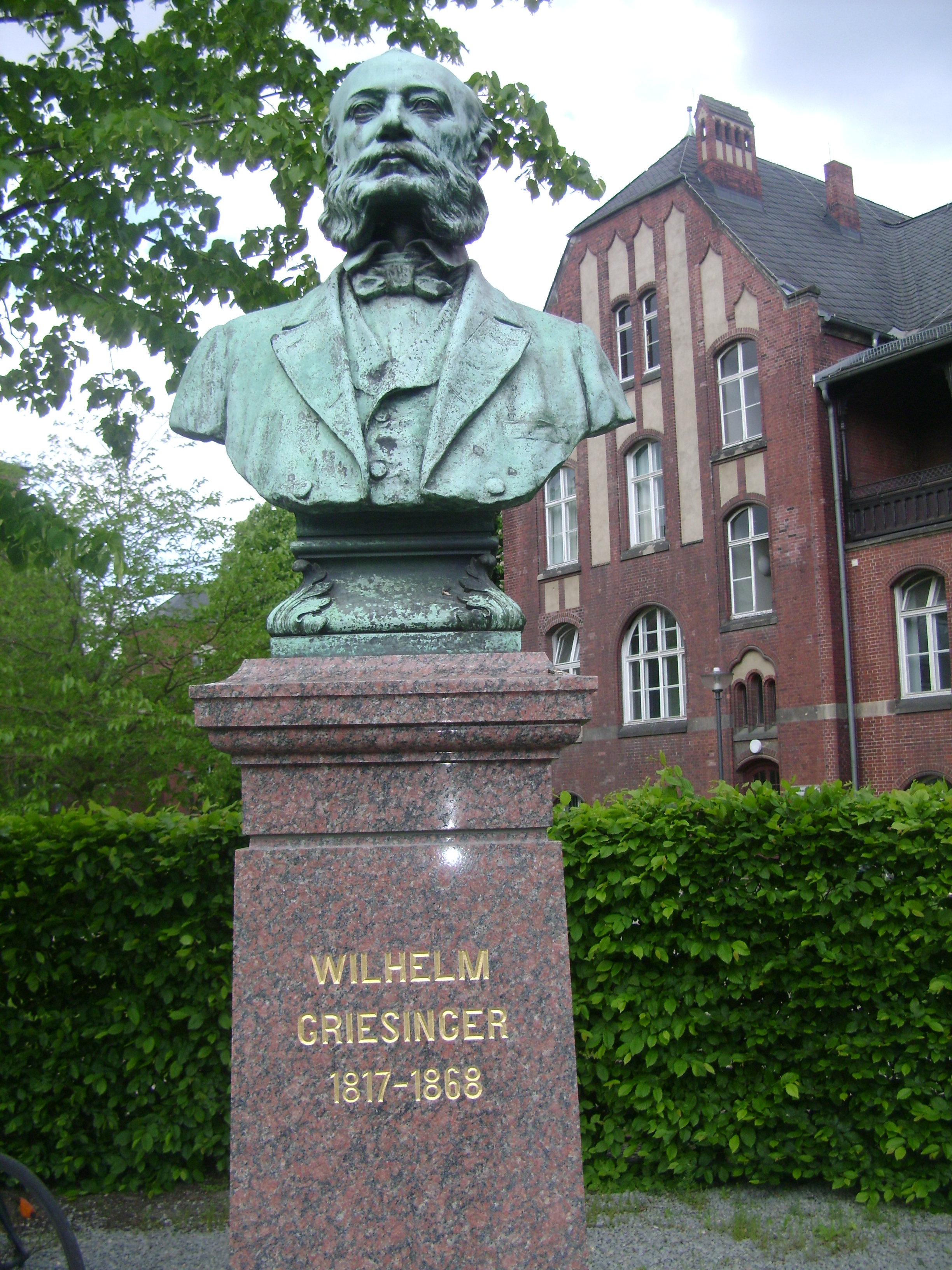 Büste von Wilhelm Griesinger (1817-1868) im Campus Mitte der Charité Berlin